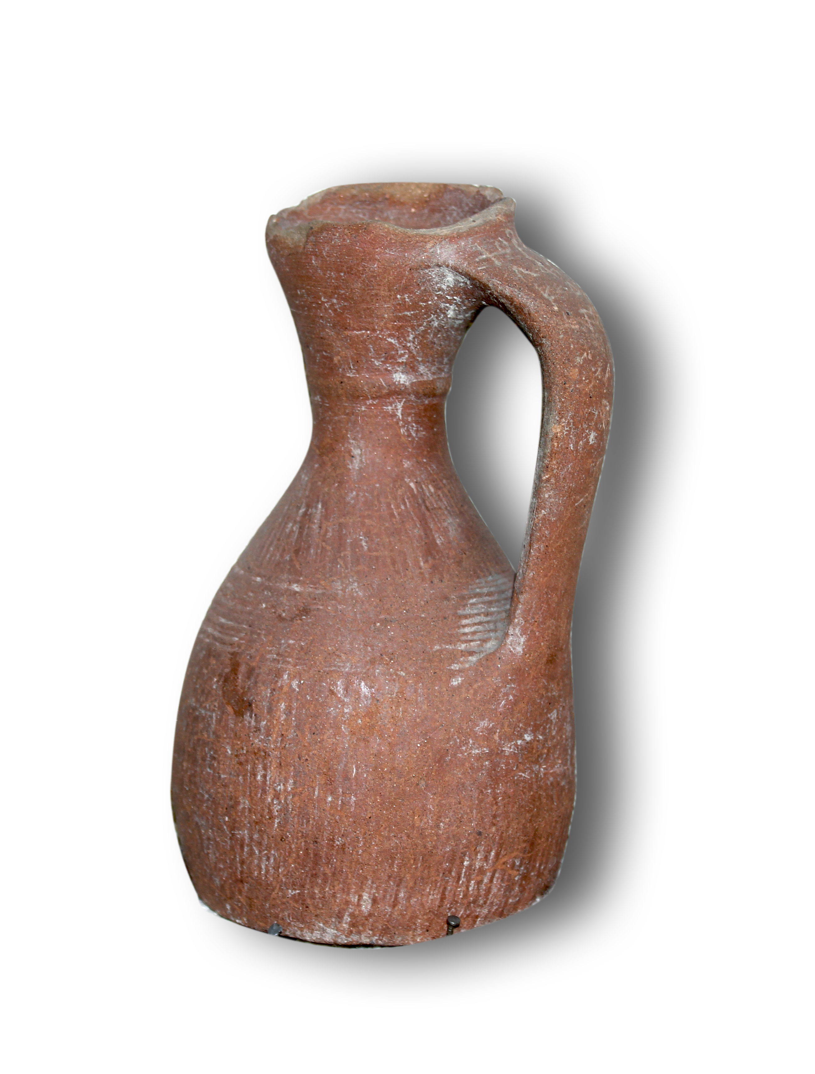 Жертвен съд, намерен в некропола.